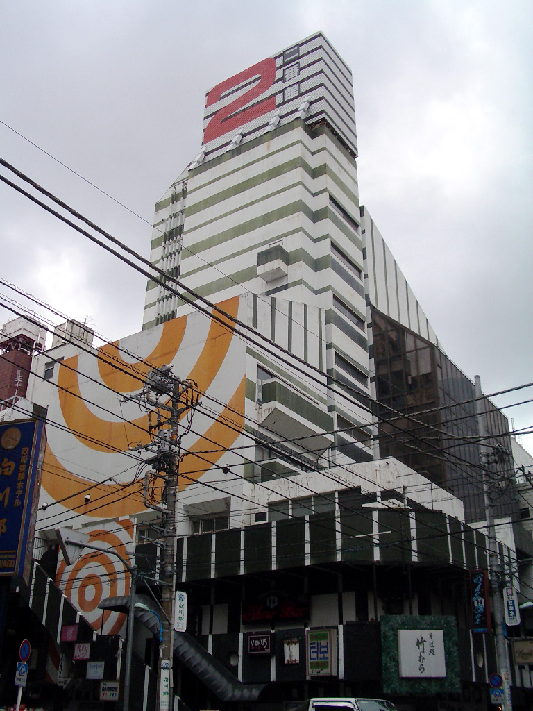 Shinjuku_nibankan